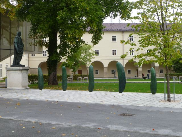 Municipium Iuvavum